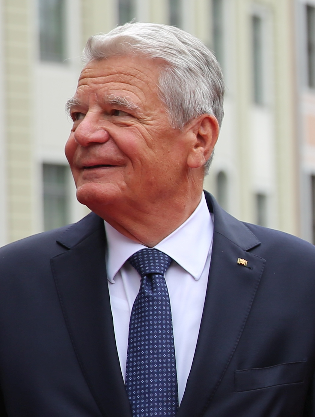 Joachim Gauck beim Tag der Deutschen Einheit 2016 in Dresden